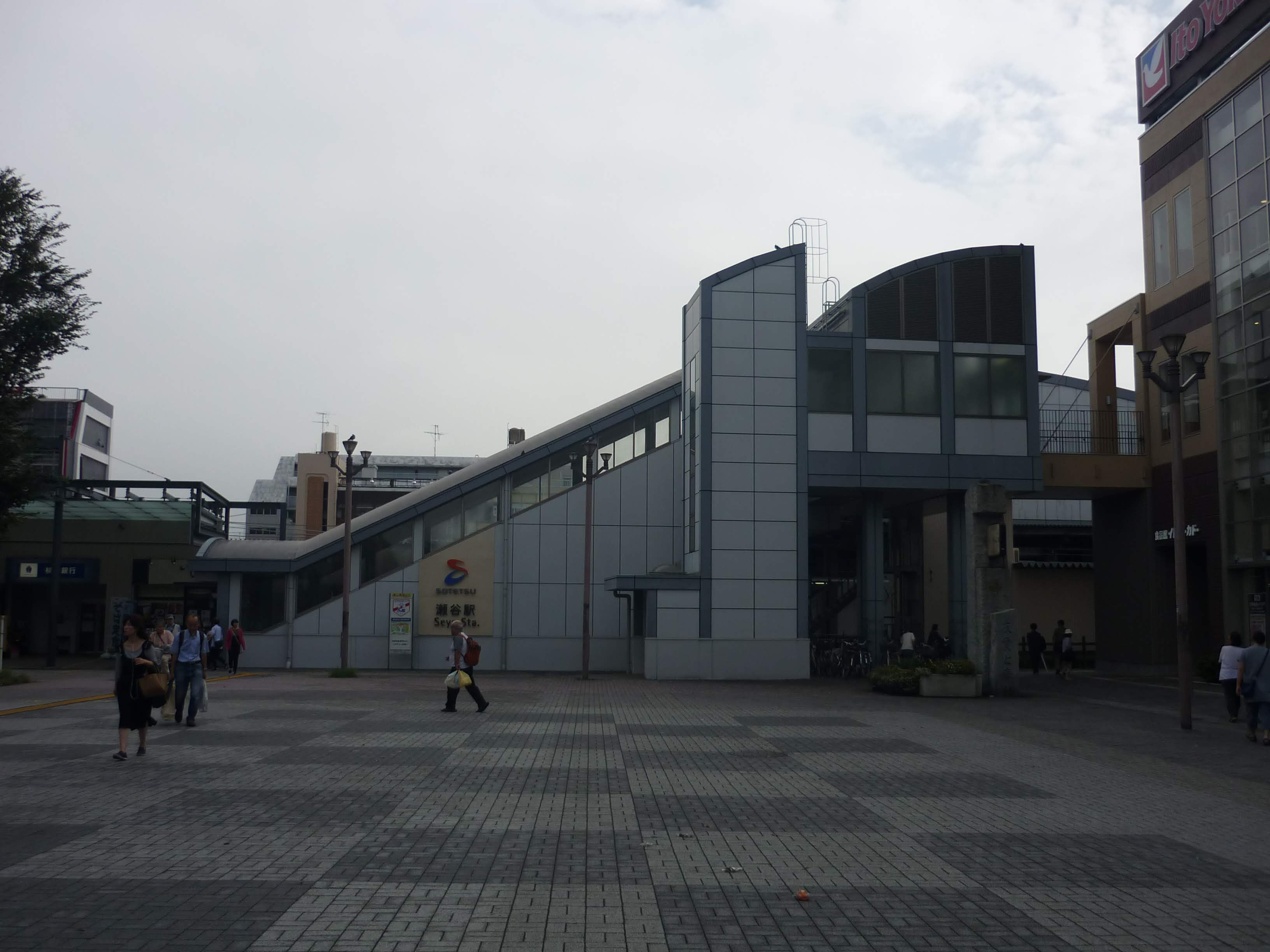 瀬谷駅北口